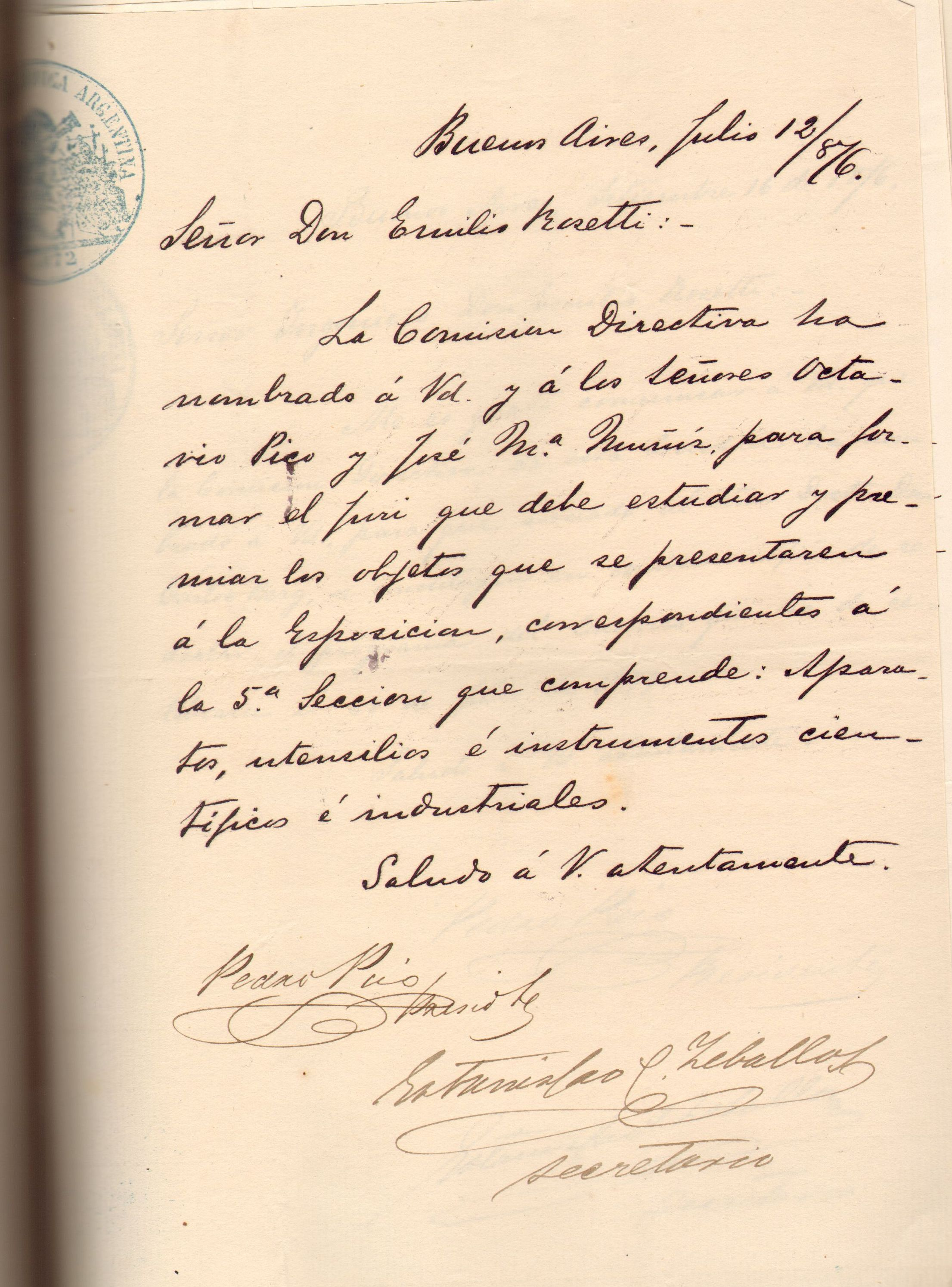 Documento S,C.A.